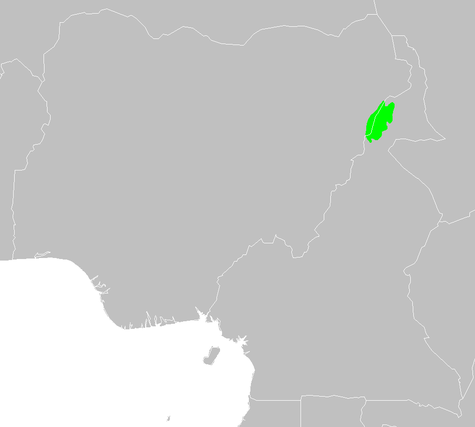 Mandara Plateau mosaic ecoregion map